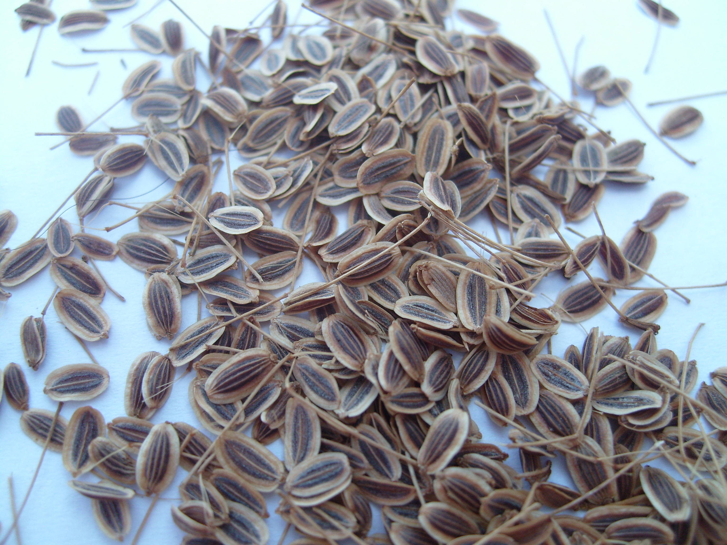 Semena kopru setého. (Anethum graveolens)